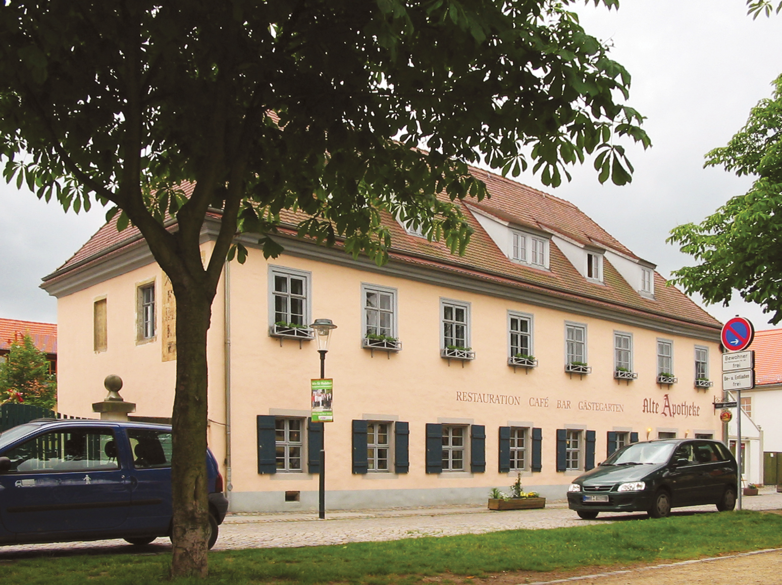 Radebeul, Gasthaus Alte Apotheke